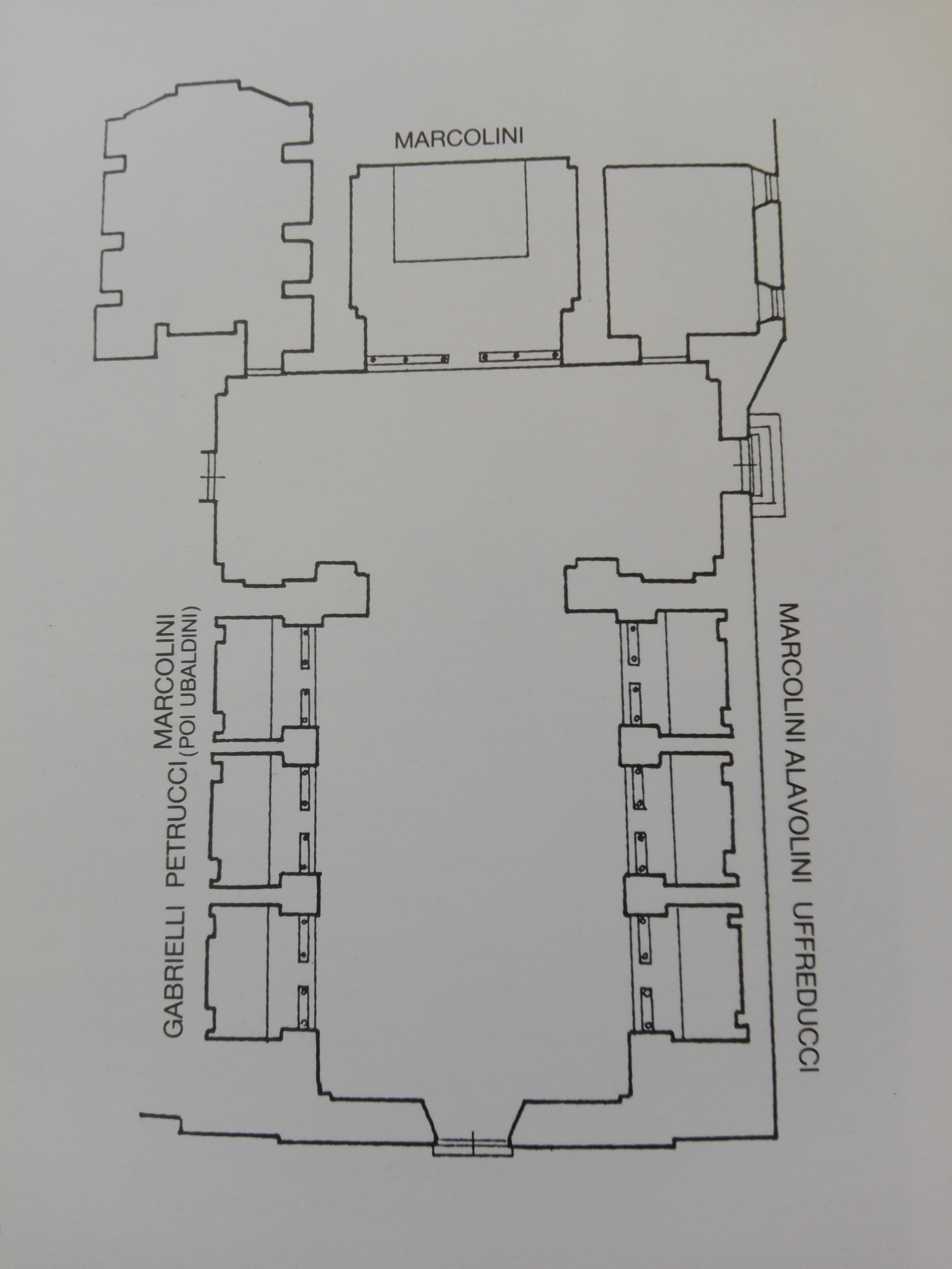 Chiesa